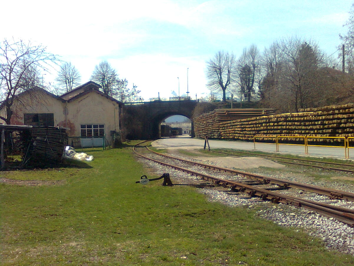 Arco di accesso all'ex deposito locomotive della stazione di Cuneo Gesso, ora sede di una fabbrica di legname.